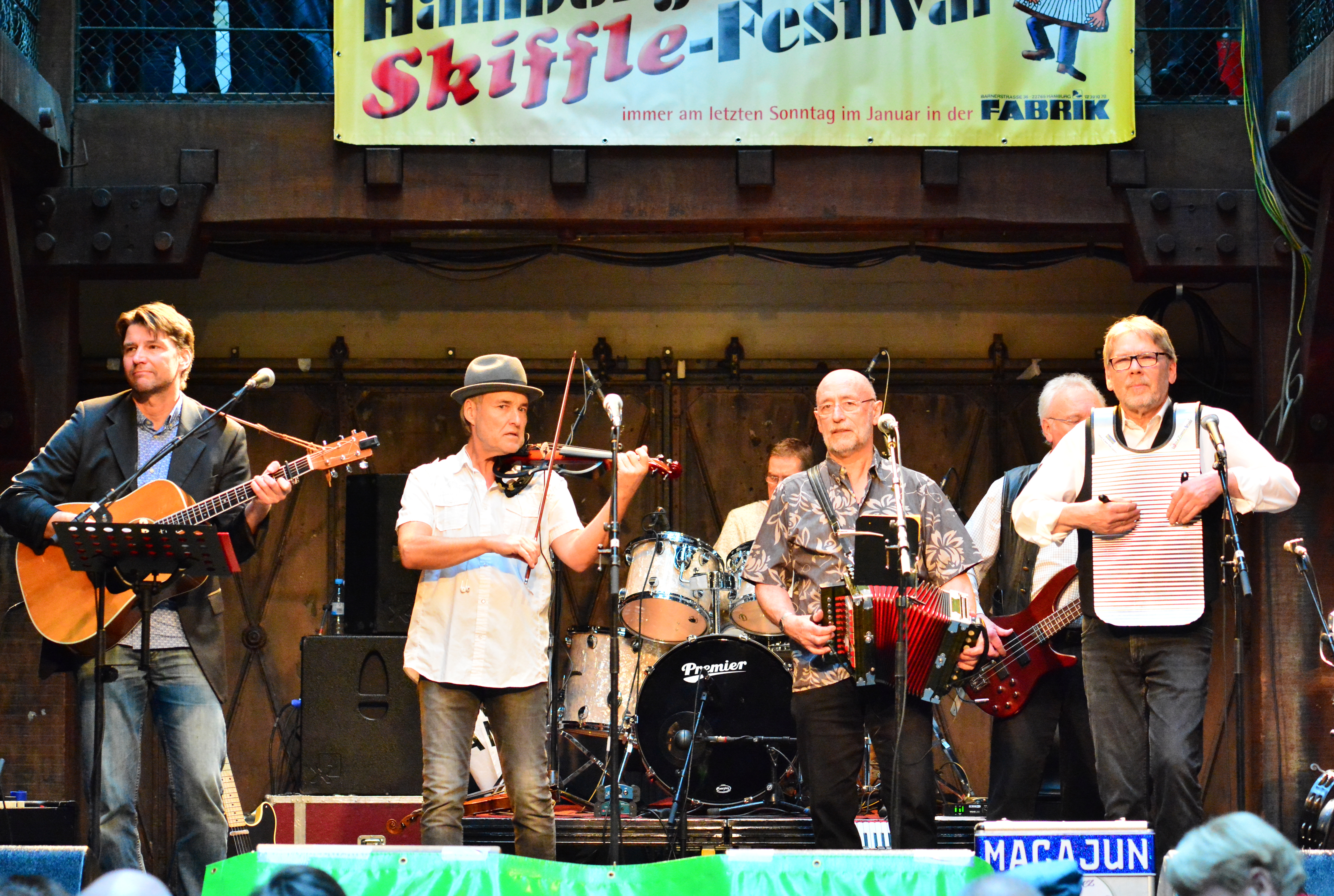 MaCajun beim 18. Hamburger Skiffle Festival in der Fabrik Hamburg